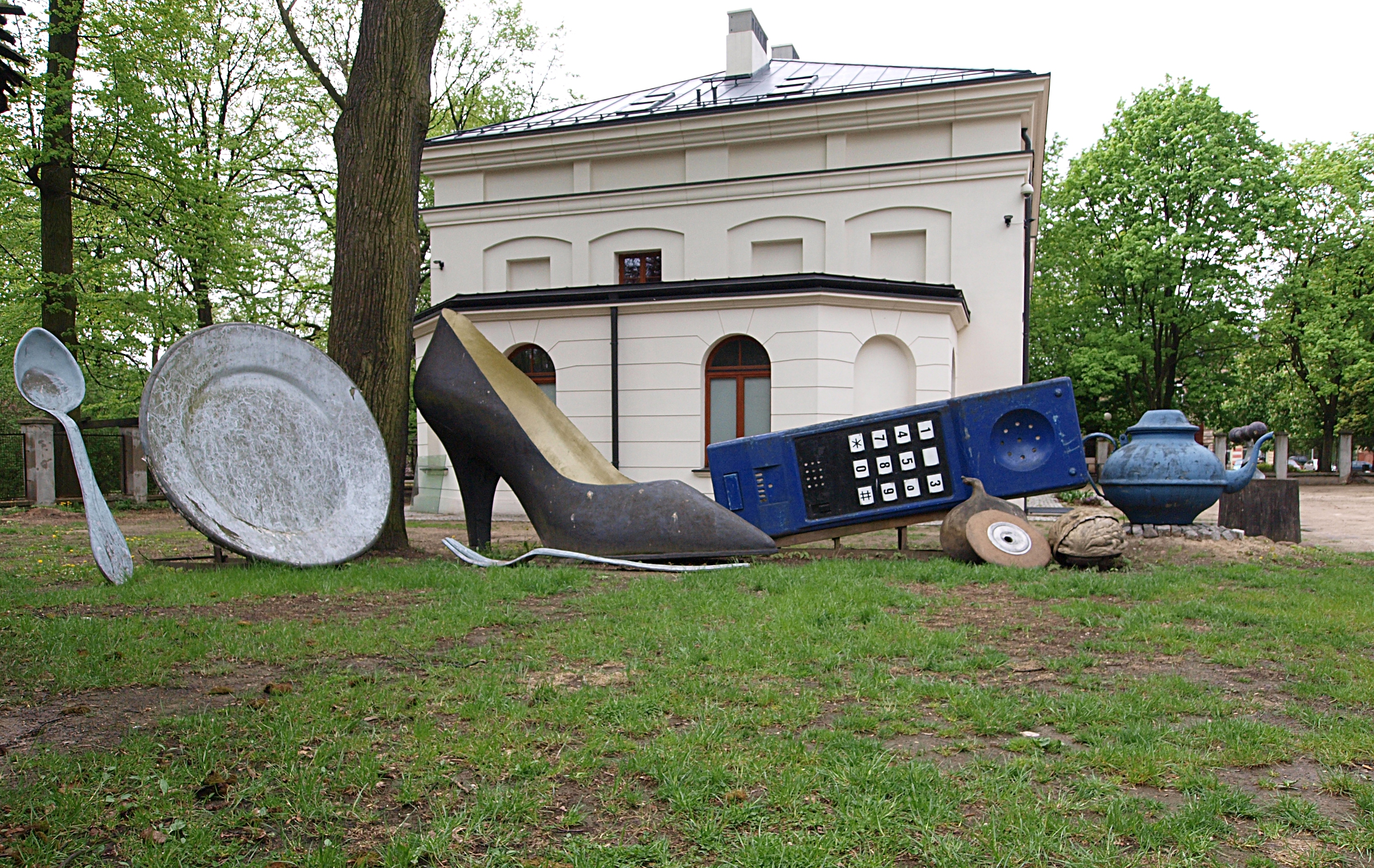 Muzeum Kinematografii. Eksponaty z filmu Kingsajz.